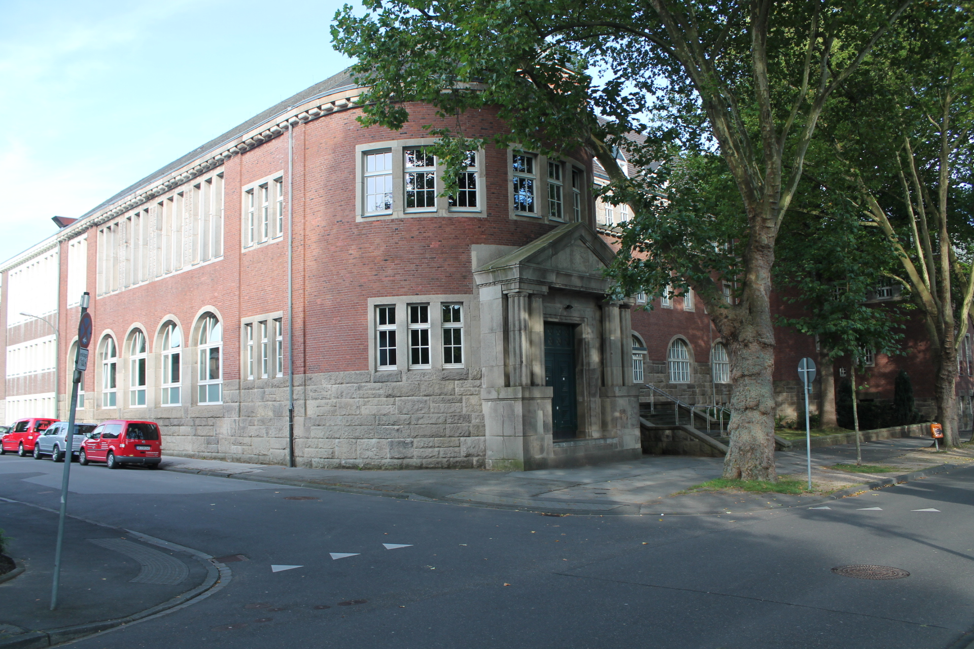 Gymnasium Peter Paul Str. in 52249 Eschweiler Bild 1.